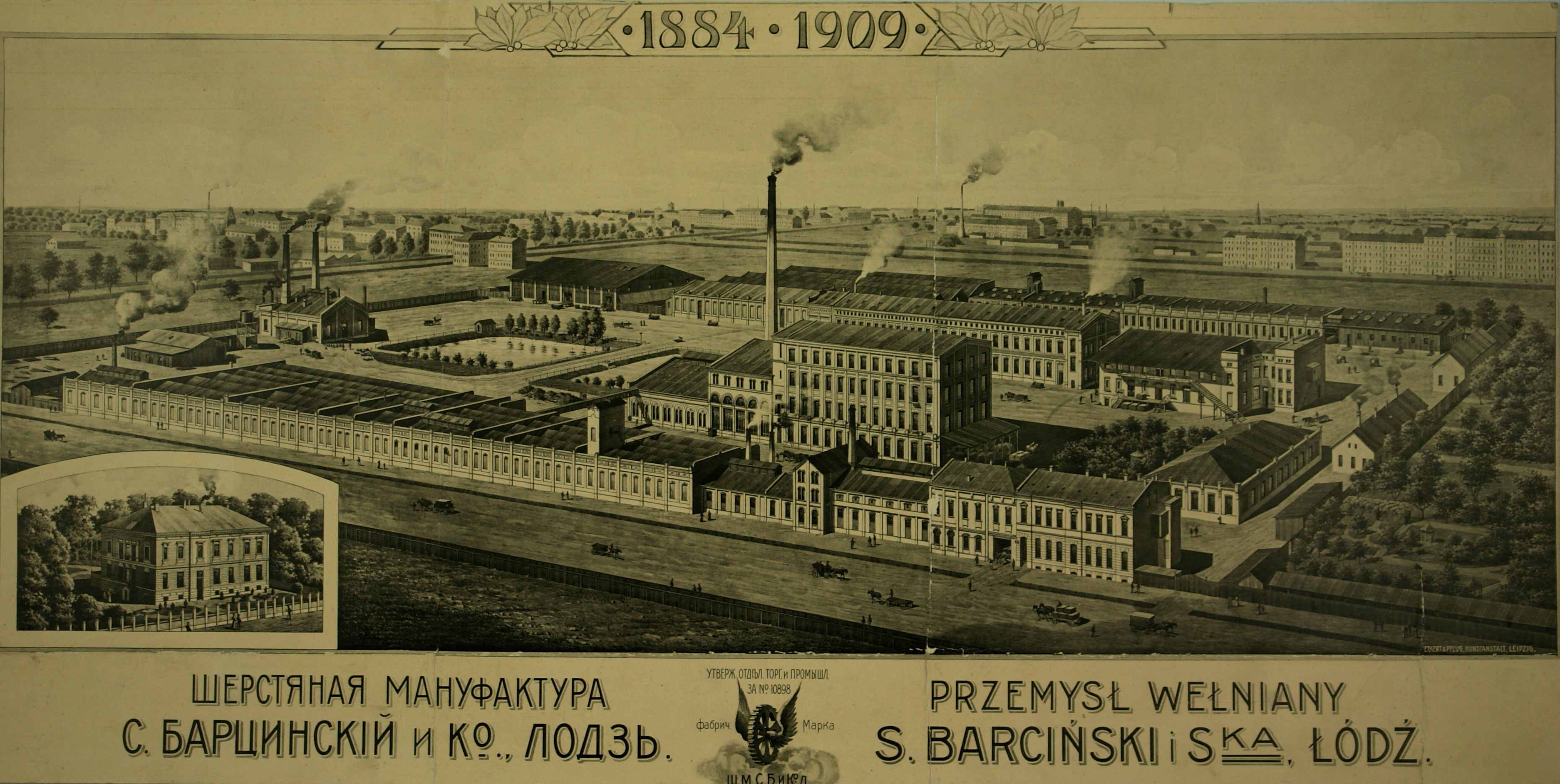 Winieta zakładów Przemysł Wełniany S. Barciński i Spółka w Łodzi